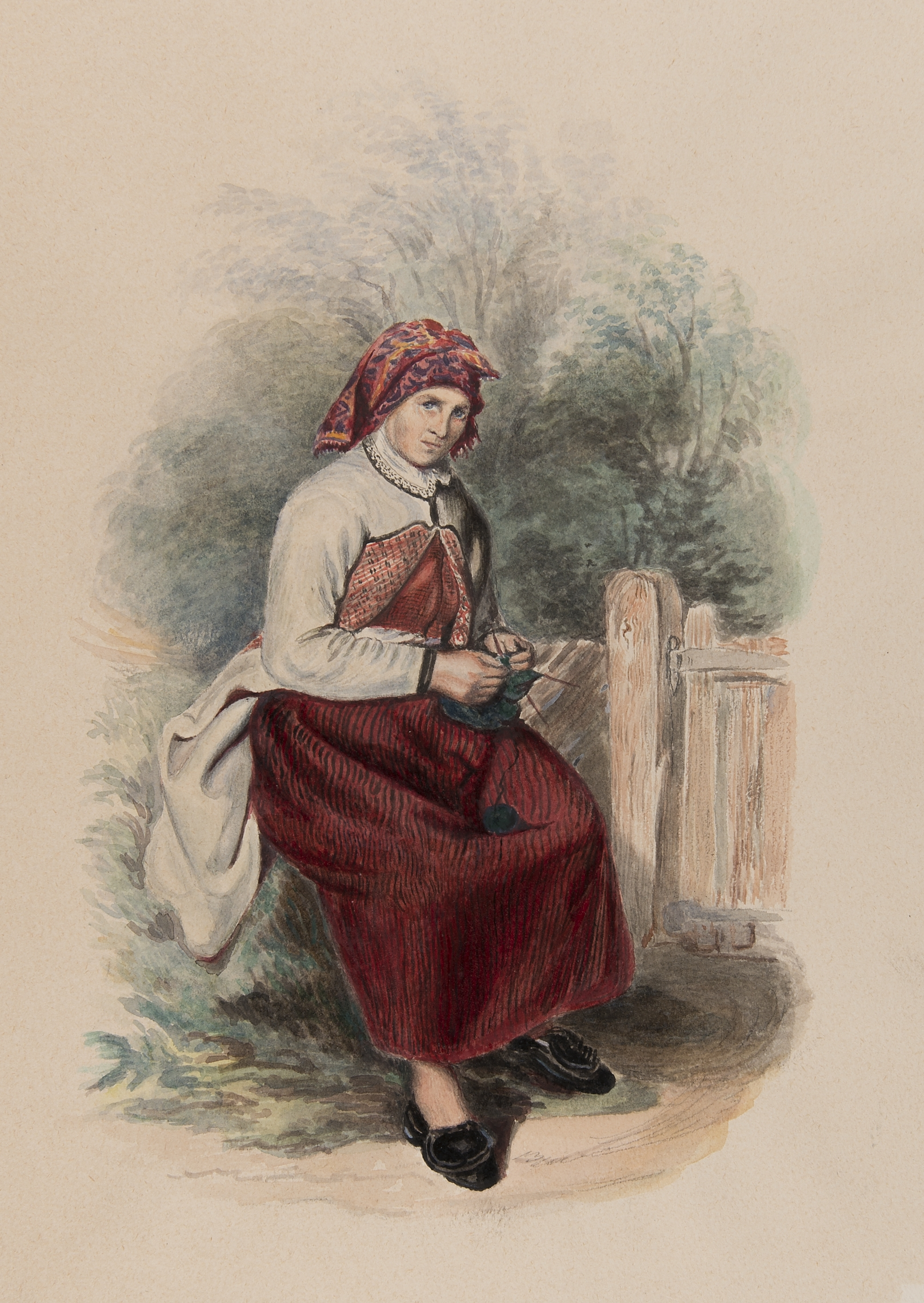 Dräkt. "Westra Wingåker, Hustrun Annika (vid Damsdal) Hvardags och resdrägt. Sittande, stickande kvinna i dräkt i helfigur. Akvarell i storformat av J.W. Wallander (kopia?) Depicted place: Q10610926 (Q10610926) (Härad), Vingåker sn (Ortnamn därutöver), Södermanland (Q626062)